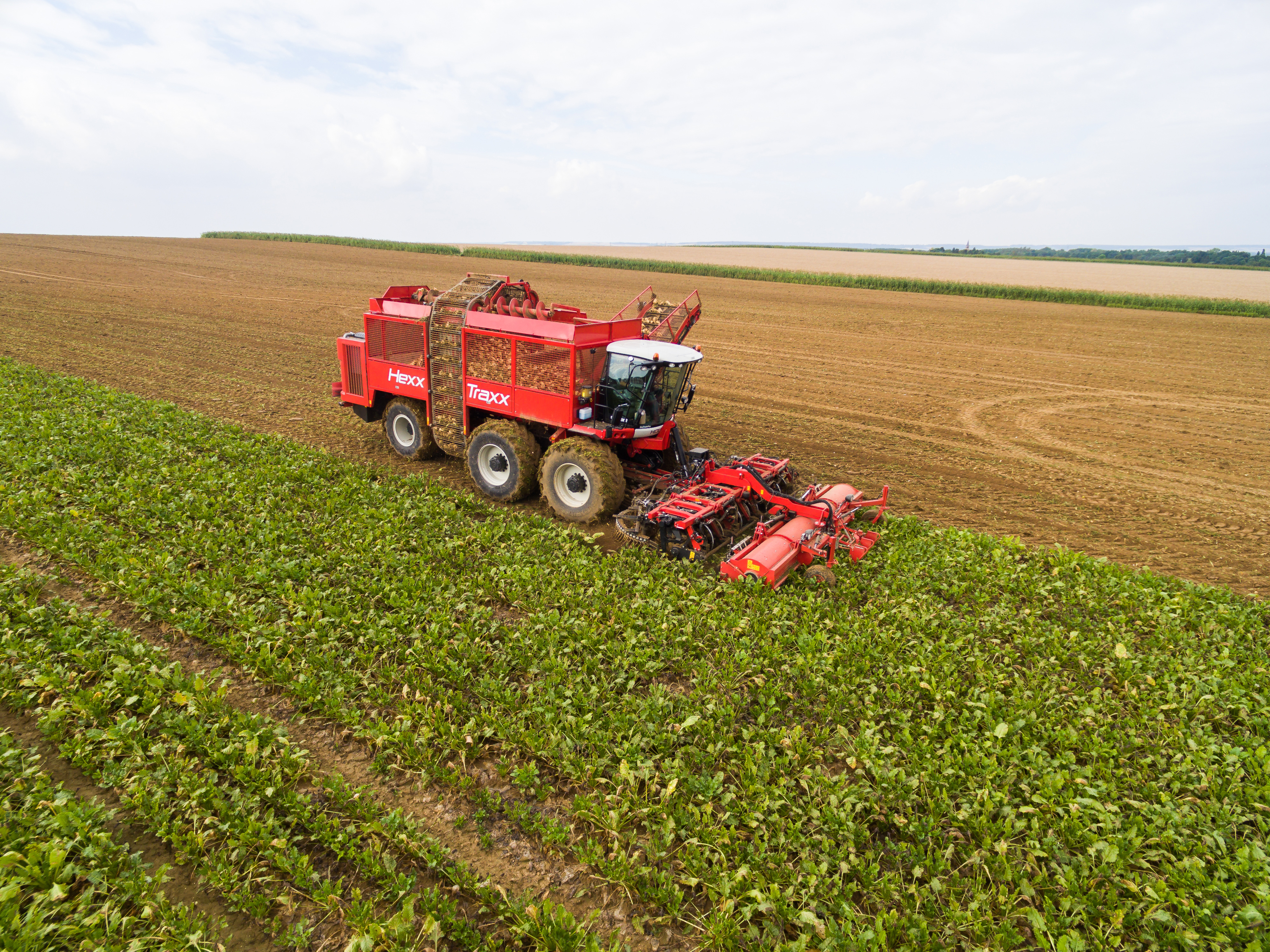 Agrifac suikerbietenrooier zesrijige bunkerrooier